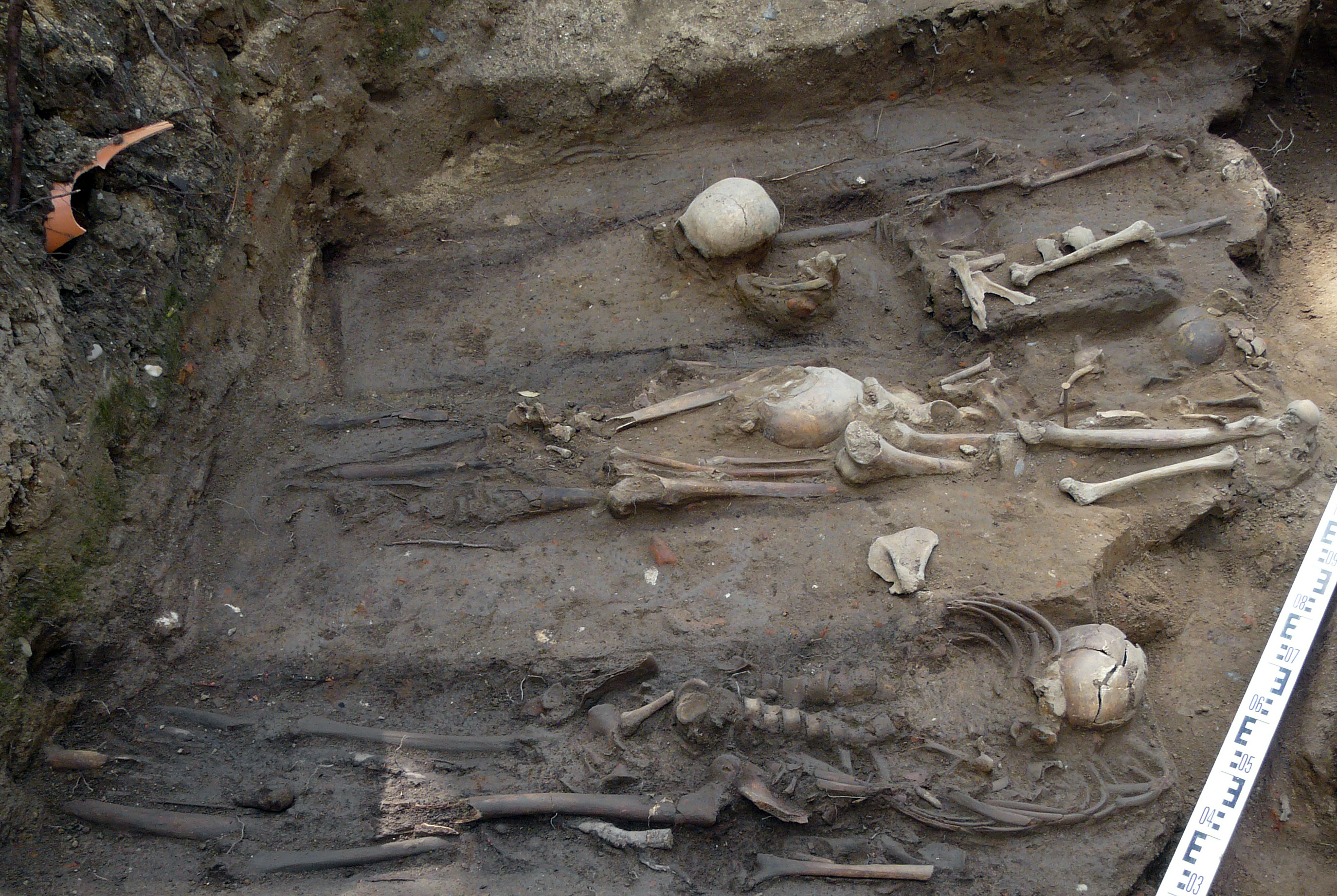 Skelett einer Grablege an der Südostecke der Evangelischen Kirche Orsoy bei den Ausgrabungen im Sommer 2010